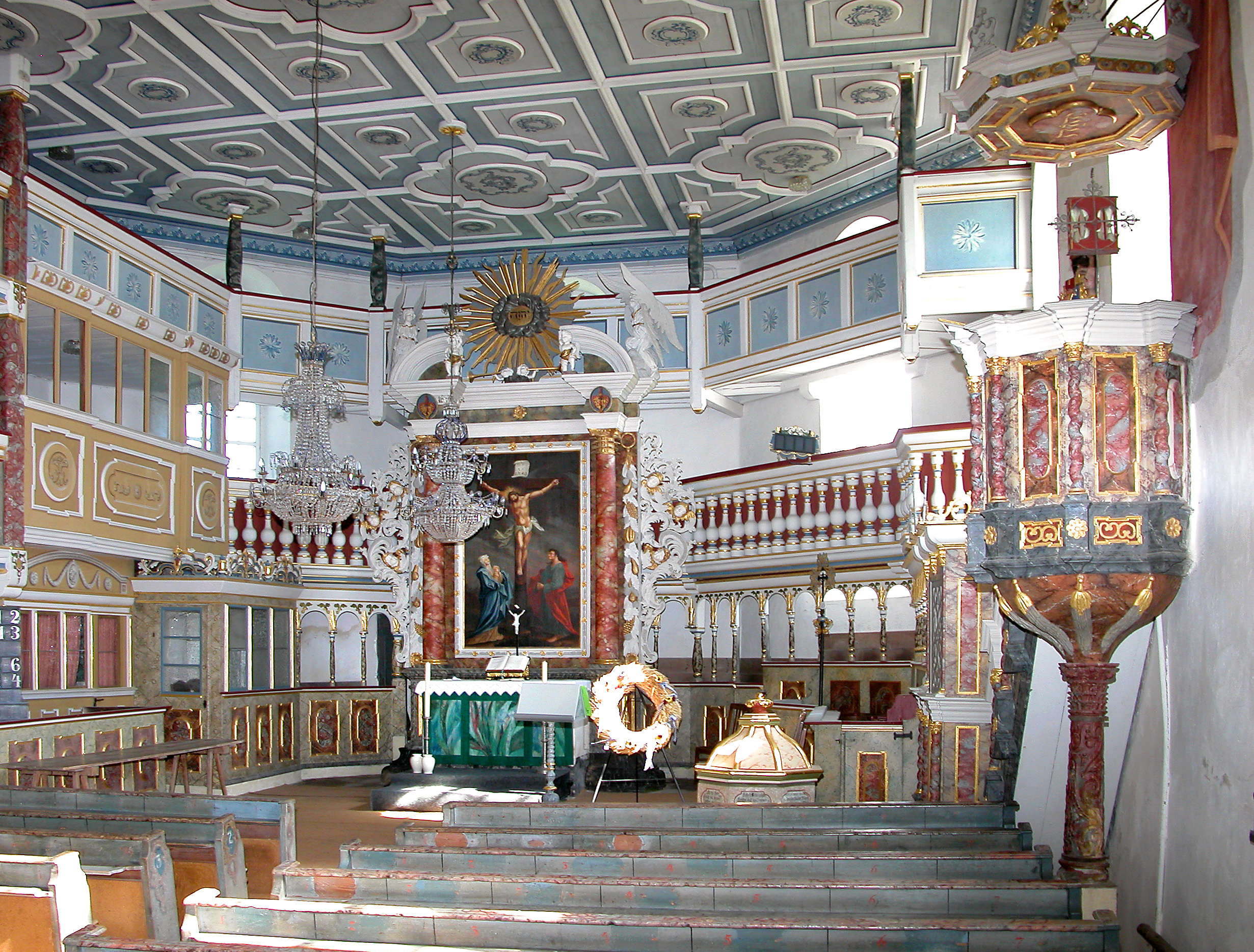 25.09.2006 09544 Cämmerswalde (Gemeinde Neuhausen/Erzgeb.): Dorfkirche (GMP: 50.709103,13.502754) romanischen Ursprungs aus dem 1. Viertel des 15 Jh., Umbau von 1703-1708 brachte barocke Ausstattung. Die Holzdecke stammt aber noch aus dem 17. Jh., ebenso Altar und Kanzel. Orgel von Adam Gottfried Oehme 1763. [DSCN11785.TIF]20060925175DR.JPG(c)Blobelt